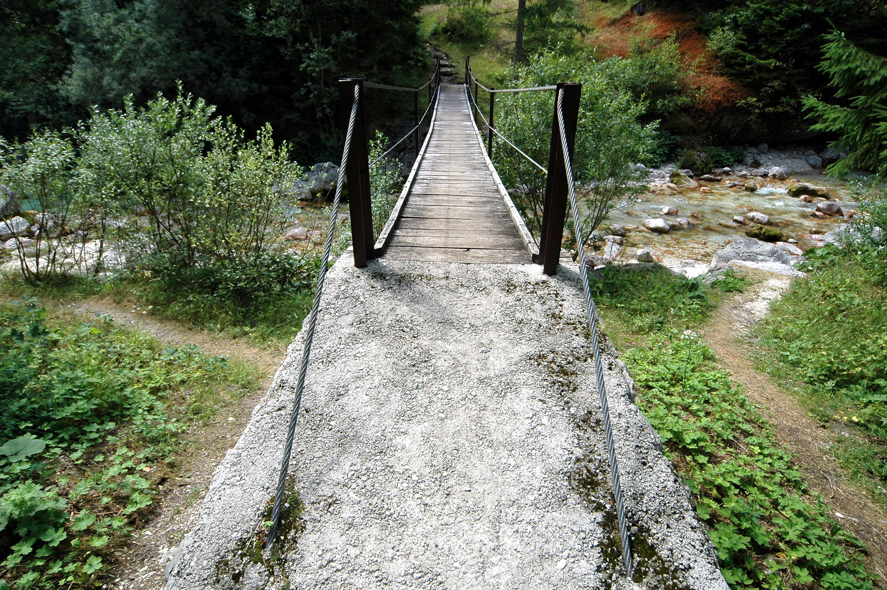 Suspension bridge over Soca at Trenta in Slovenija